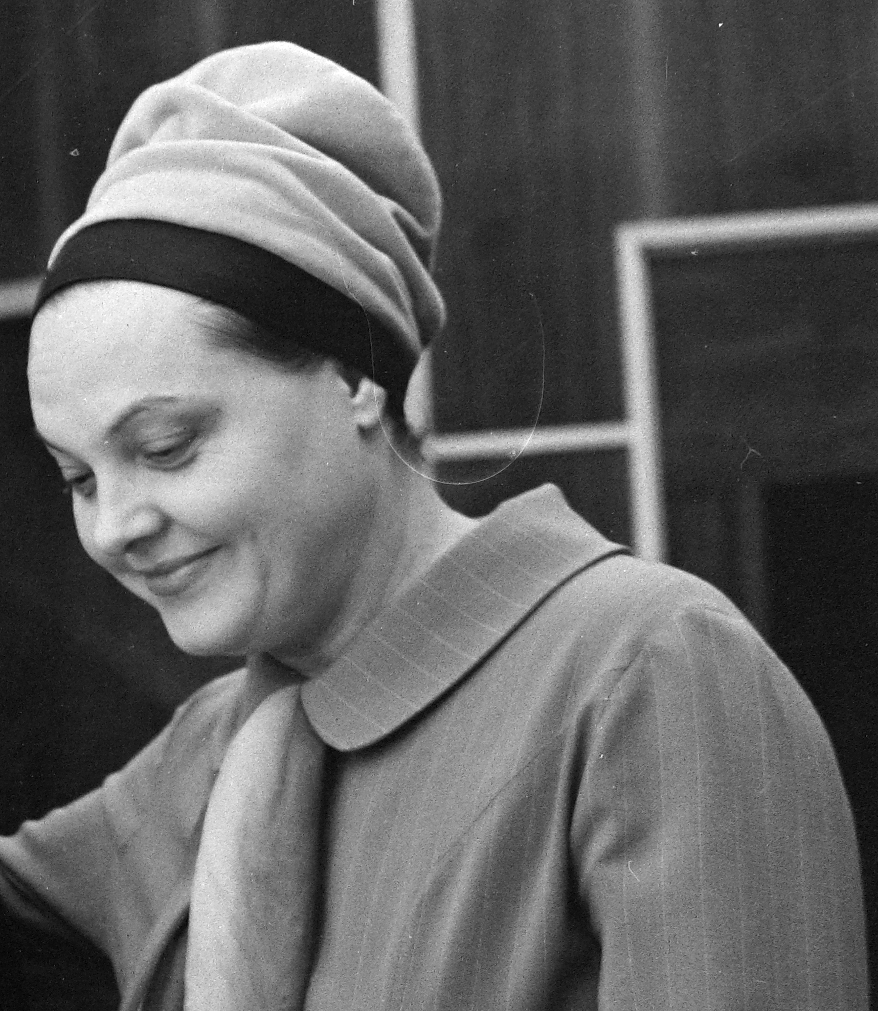 Náray Teri magyar színésznő.